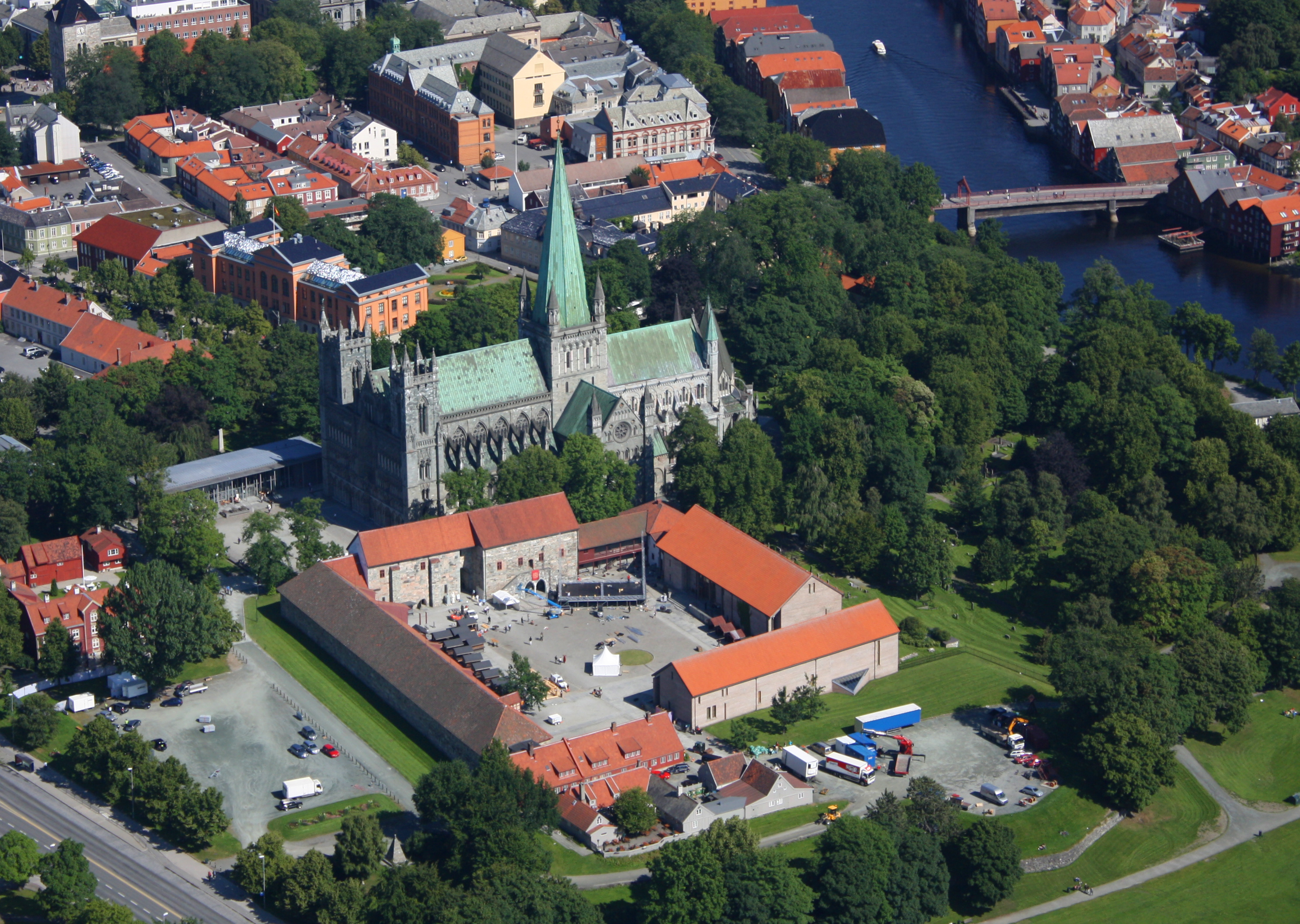 Nidarosdomen og Erkebispegården